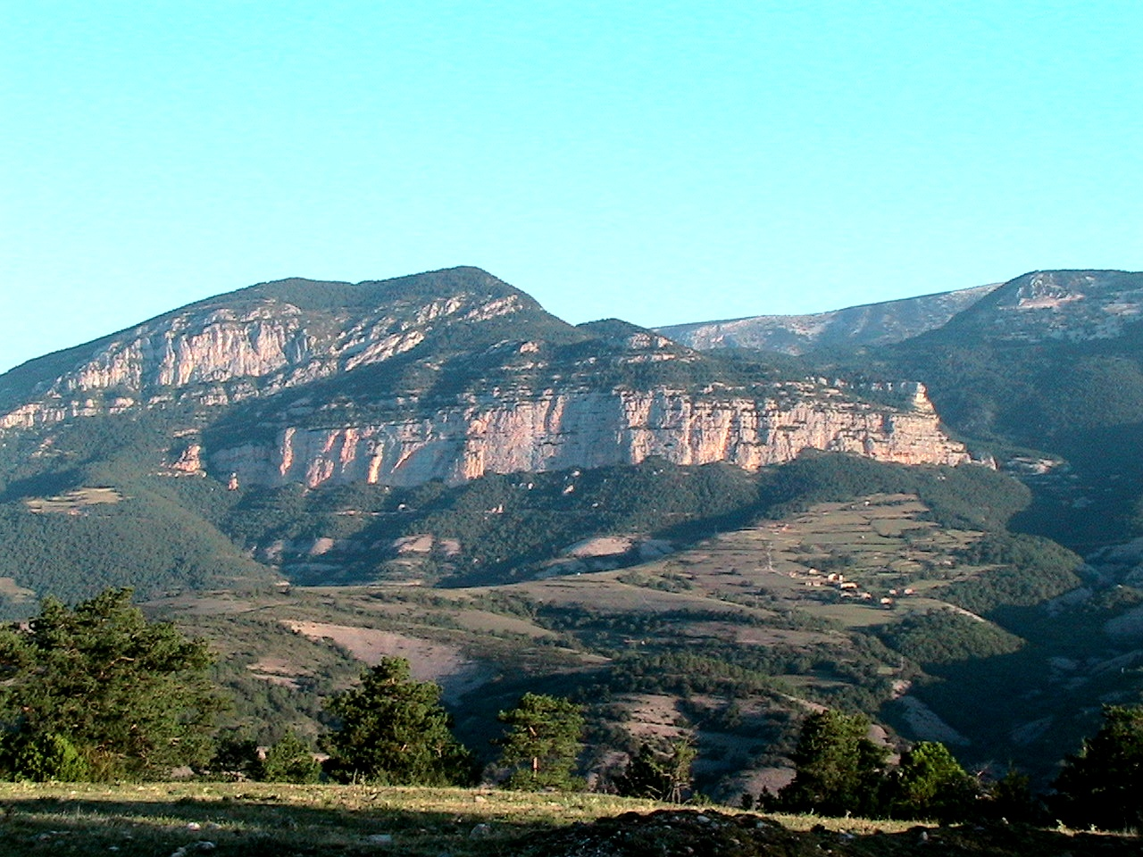 Paret de la Roca de Canalda sota el Puig Sobirà. Odèn (Solsonès - Catalunya)